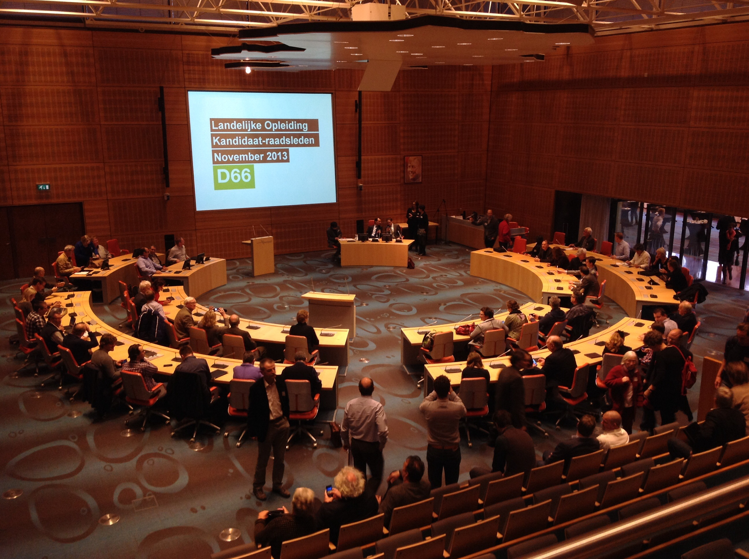 Provinciehuis van Overijssel in Zwolle, tijdens een training van aspirant-raadsleden van D66.